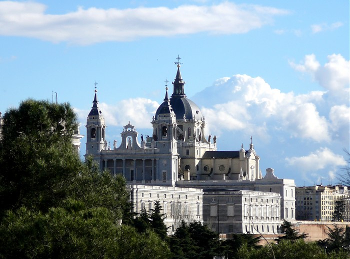 Catedral de la Almudena